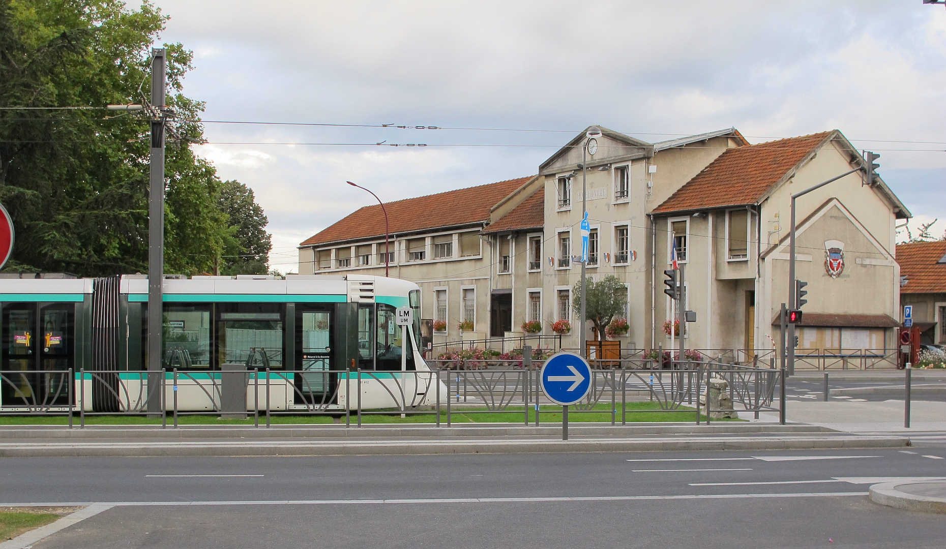 Un tramway devant l'ancienne mairie de Bezons (Val d'Oise) le 13 août 2012.